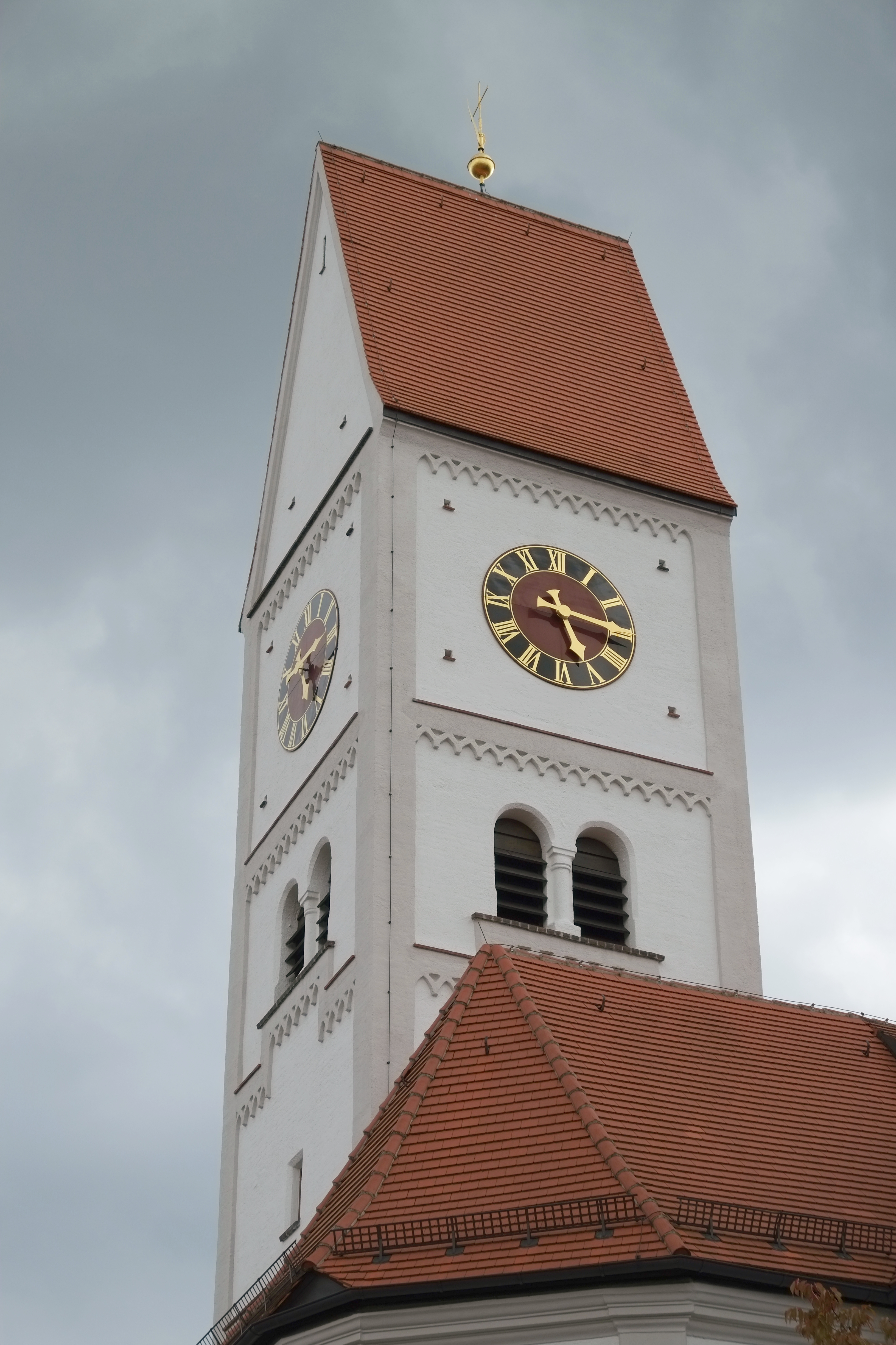 Katholische Pfarrkirche St. Nikolaus in Stadtbergen im Landkreis Augsburg (Bayern, Deutschland)